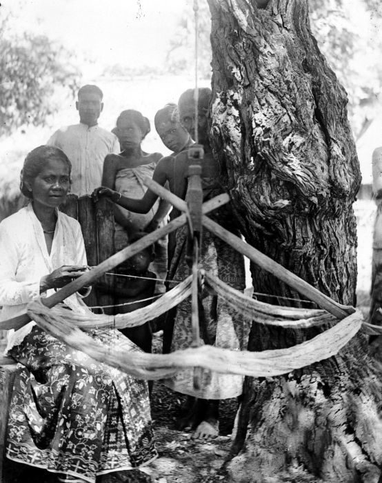 Repronegatief. In veel streken in de Archipel waar vanaf de 19e eeuw goedkope en sterke textiel uit het Westen werd ingevoerd nam het zelf zpinnen en weven sterk af. In bepaalde gebieden verdween het spinnen door de import van sterke en gelijkmatige industriële garens, maar niet het weven (bijvoorbeeld op Java). In andere streken, waar de internationale handel later en moeizamer was doorgedrongen, bleven spinnen en weven nog lang bestaan. Voor het spinnen werd op Java en Sumatra vooral het spinnewiel gebruikt, terwijl de vrouwen van de Kleine Soenda Eilanden en de Zuidoost-Molukken vooral het spinstokje hanteerden. Het op de foto afgbeelde instrument is een garenwinder. (P. Boomgaard, 2001). Rotinese vrouw met garenwinder, Timor